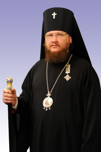 Архиепископ Феодосий (Снигирёв)